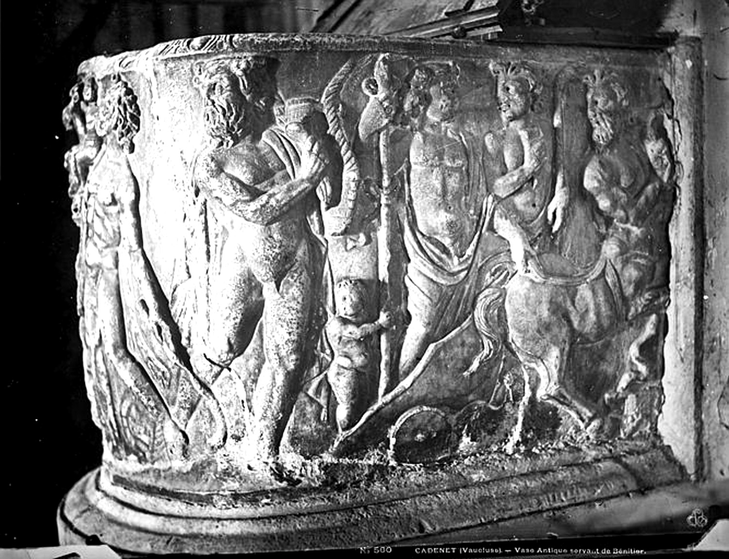 Cadenet baptistère